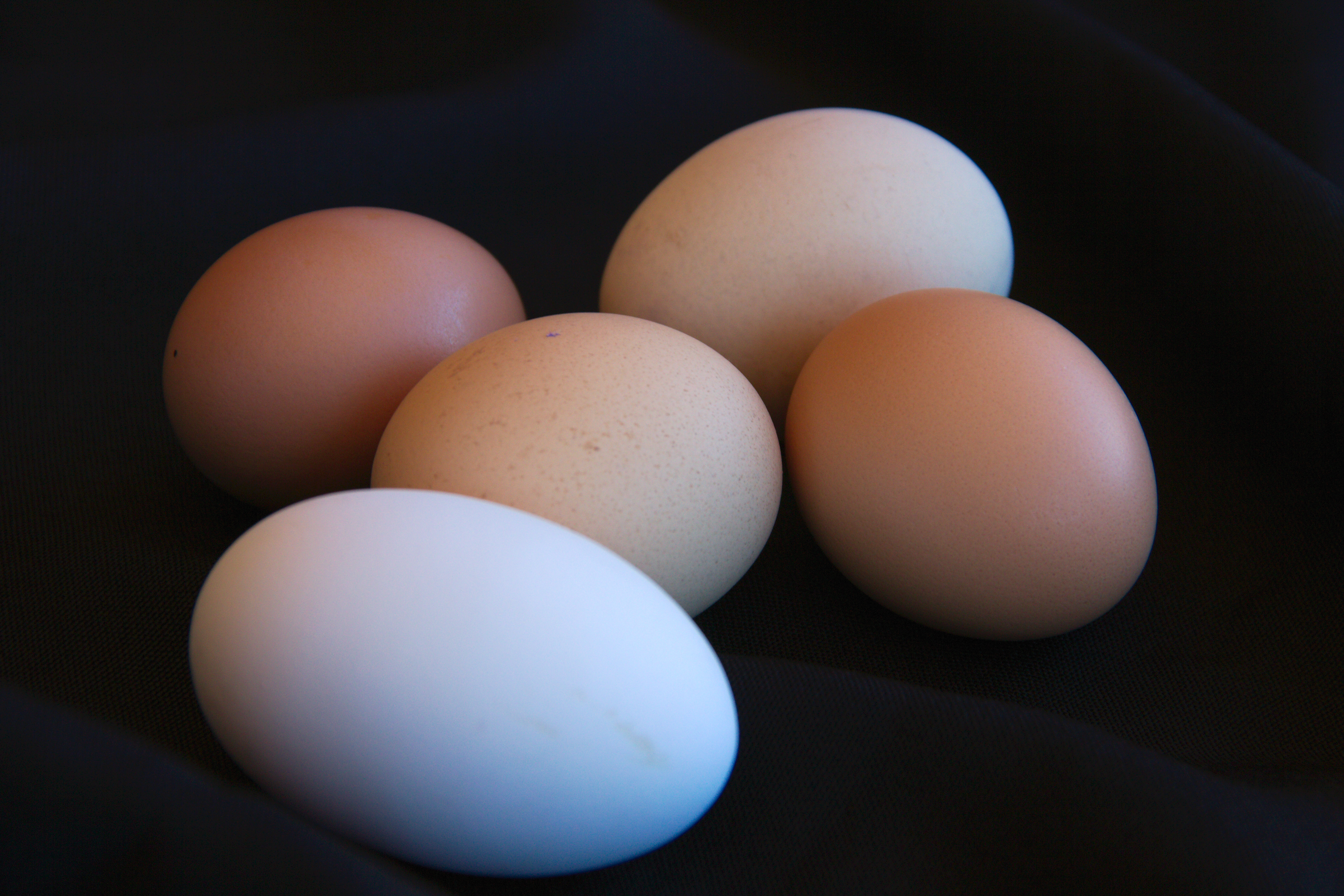 Huevos de gallina de diferentes tamaños y colores.